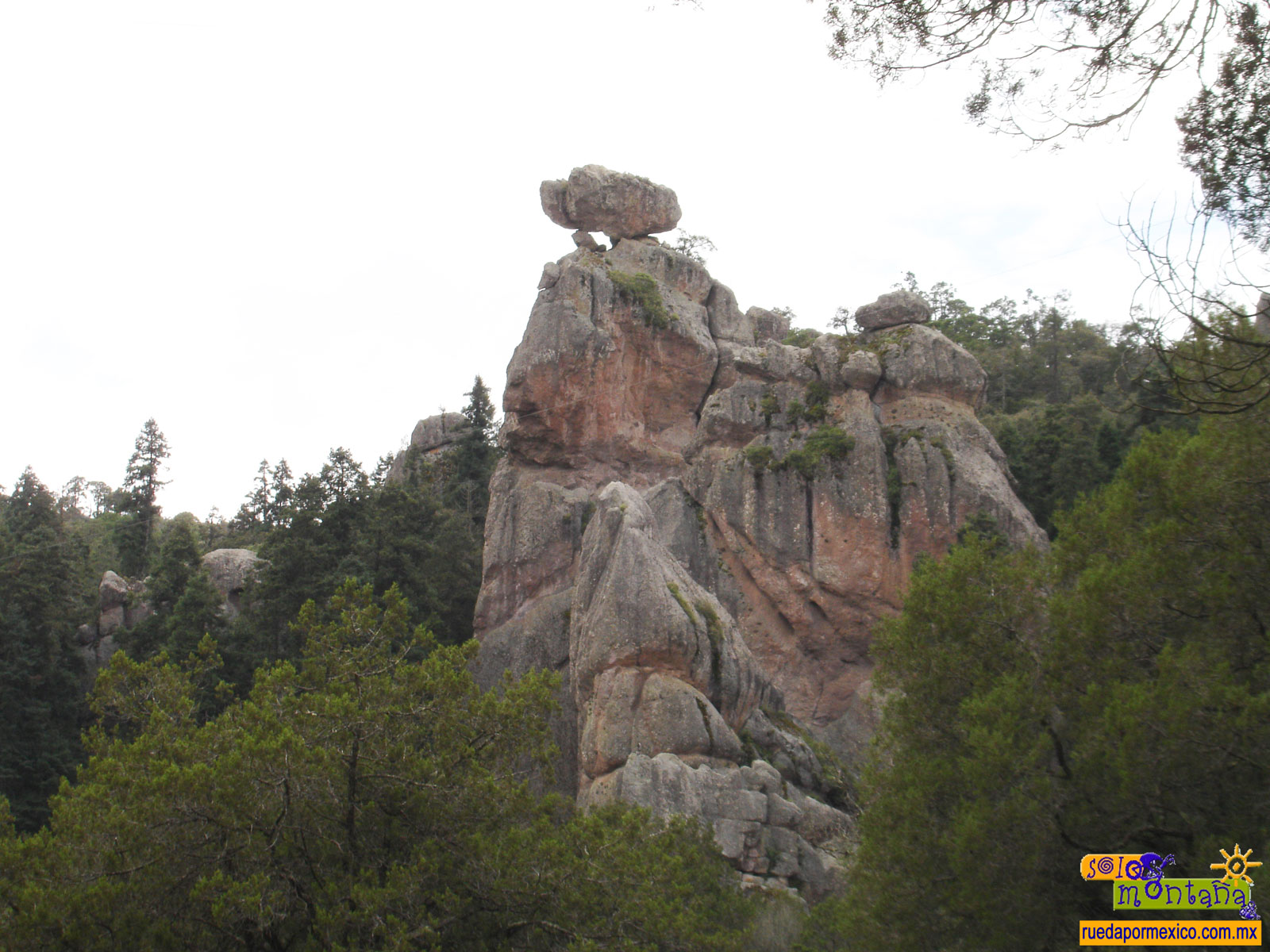 Peñas Cargadas es Real del Monte, Hidalgo, Mexico.